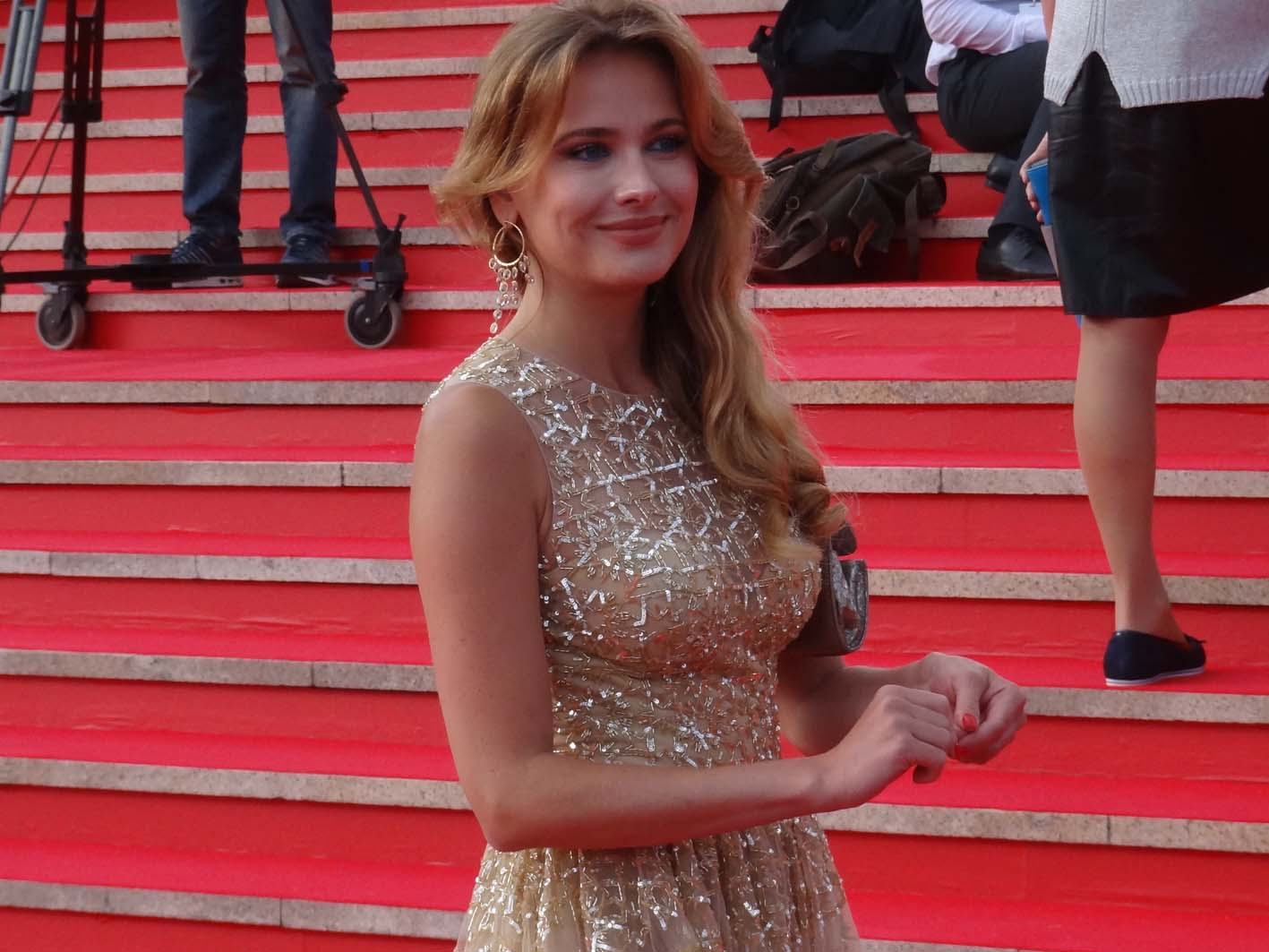 Анна Андреевна Горшко́ва — российская актриса и фотомодель. Церемония открытия фестиваля "Кинотавр -2014" в Сочи.